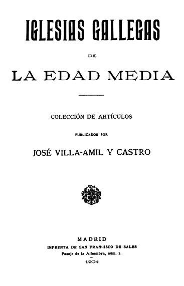 Iglesias gallegas de la edad media, colección de artículos publicados por José Villa-Amil y Castro